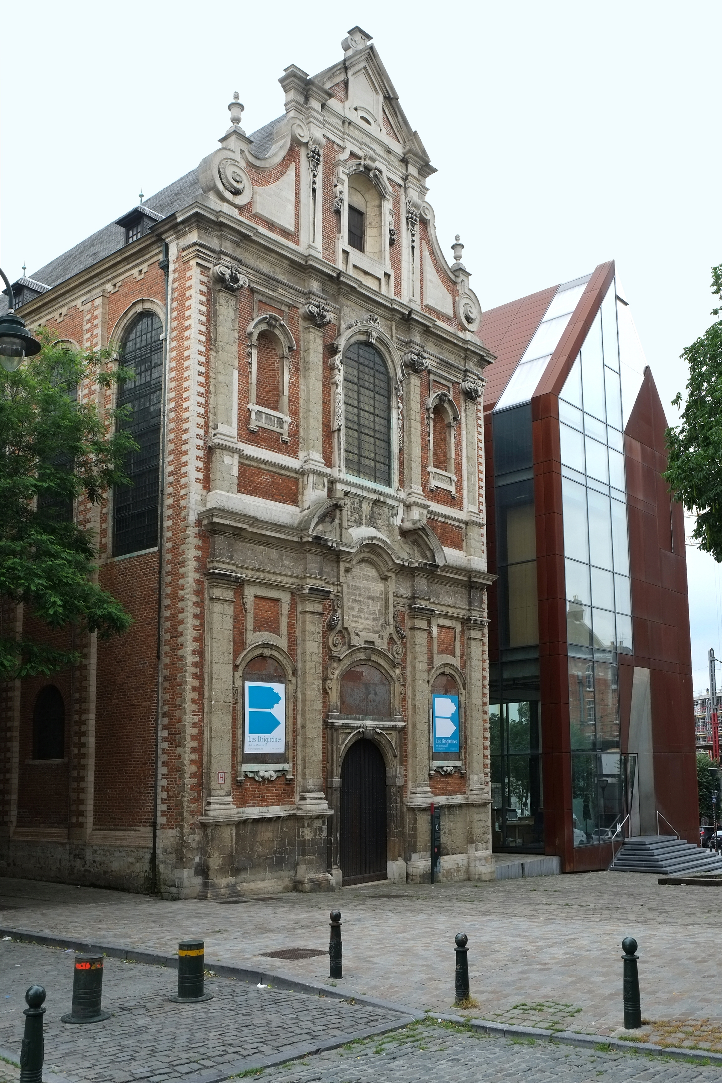 La Chapelle des Brigittines et son extension Bruxelles